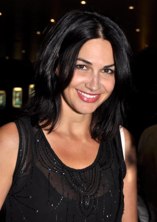 Helena Noguerra au festival du cinéma américain de Deauville